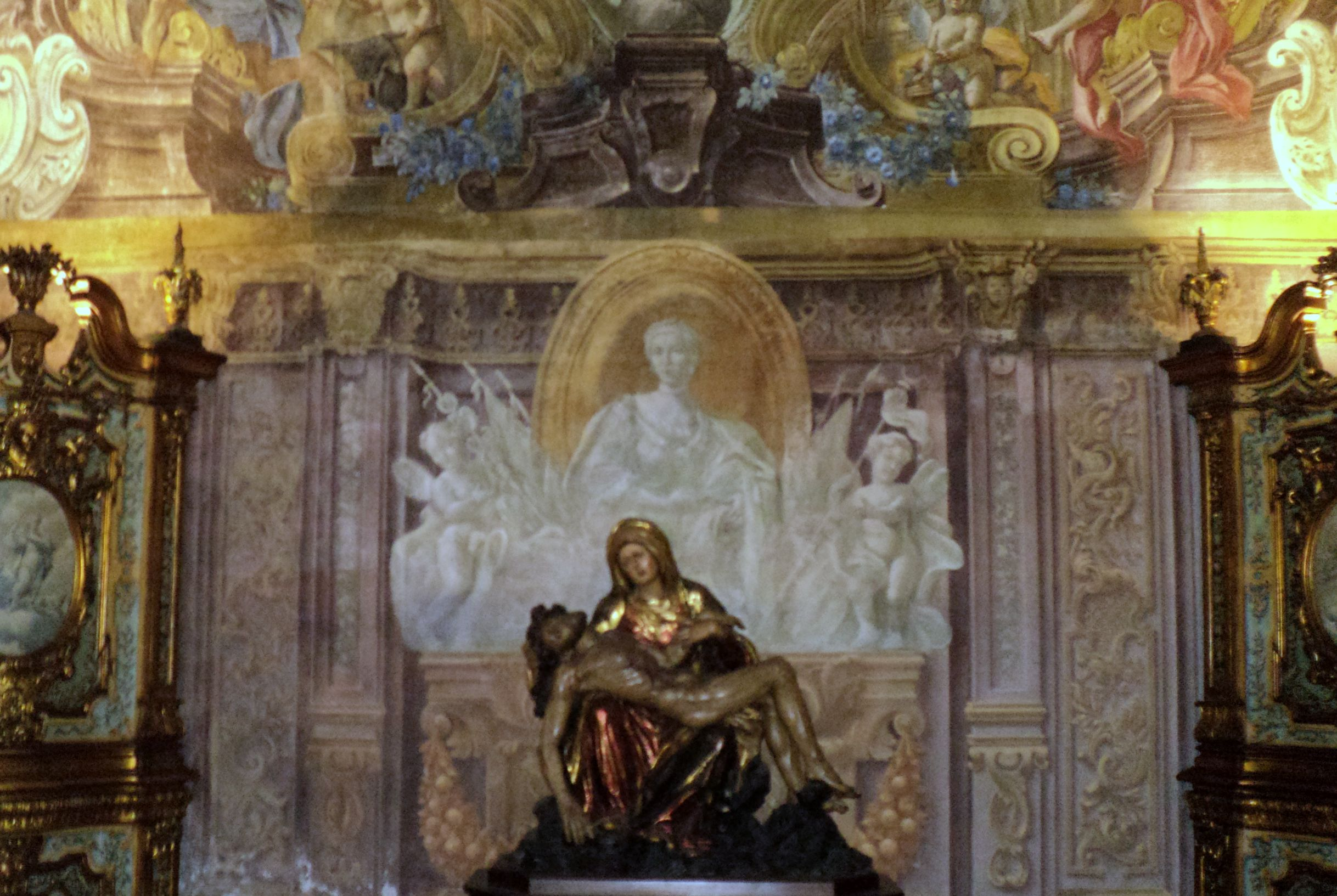 Pietà